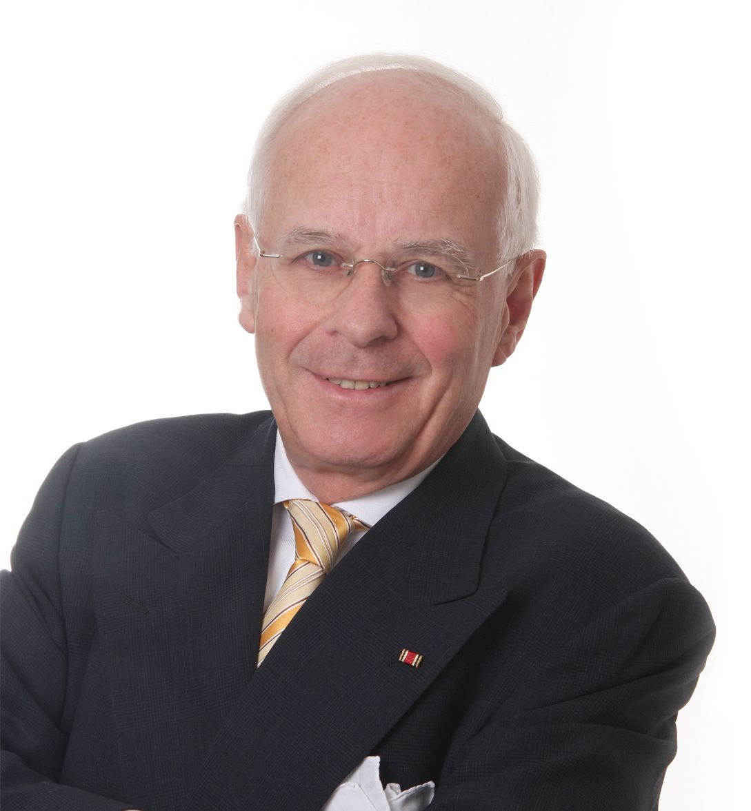 Walter Rau